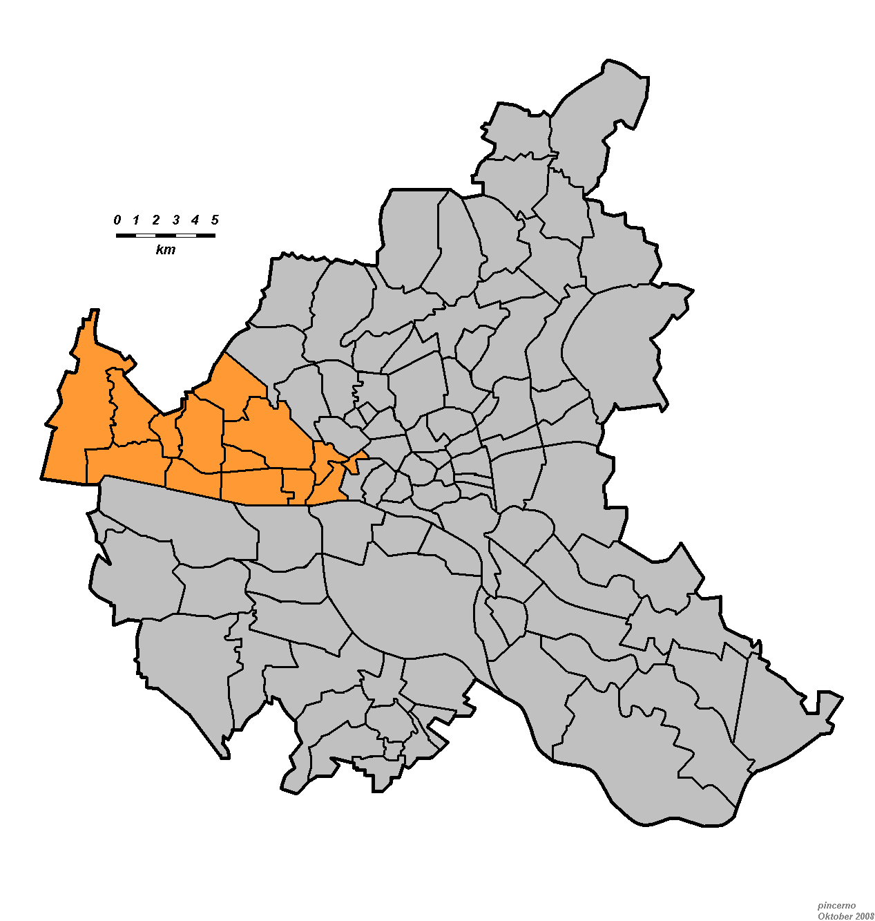 Der Bezirk Altona in Hamburg.